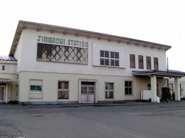 Jimmachi Station, Higashine, Yamagata, Japan